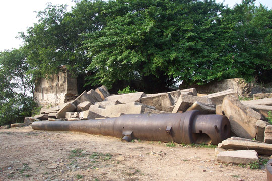 南山顶炮台上残留的钢炮